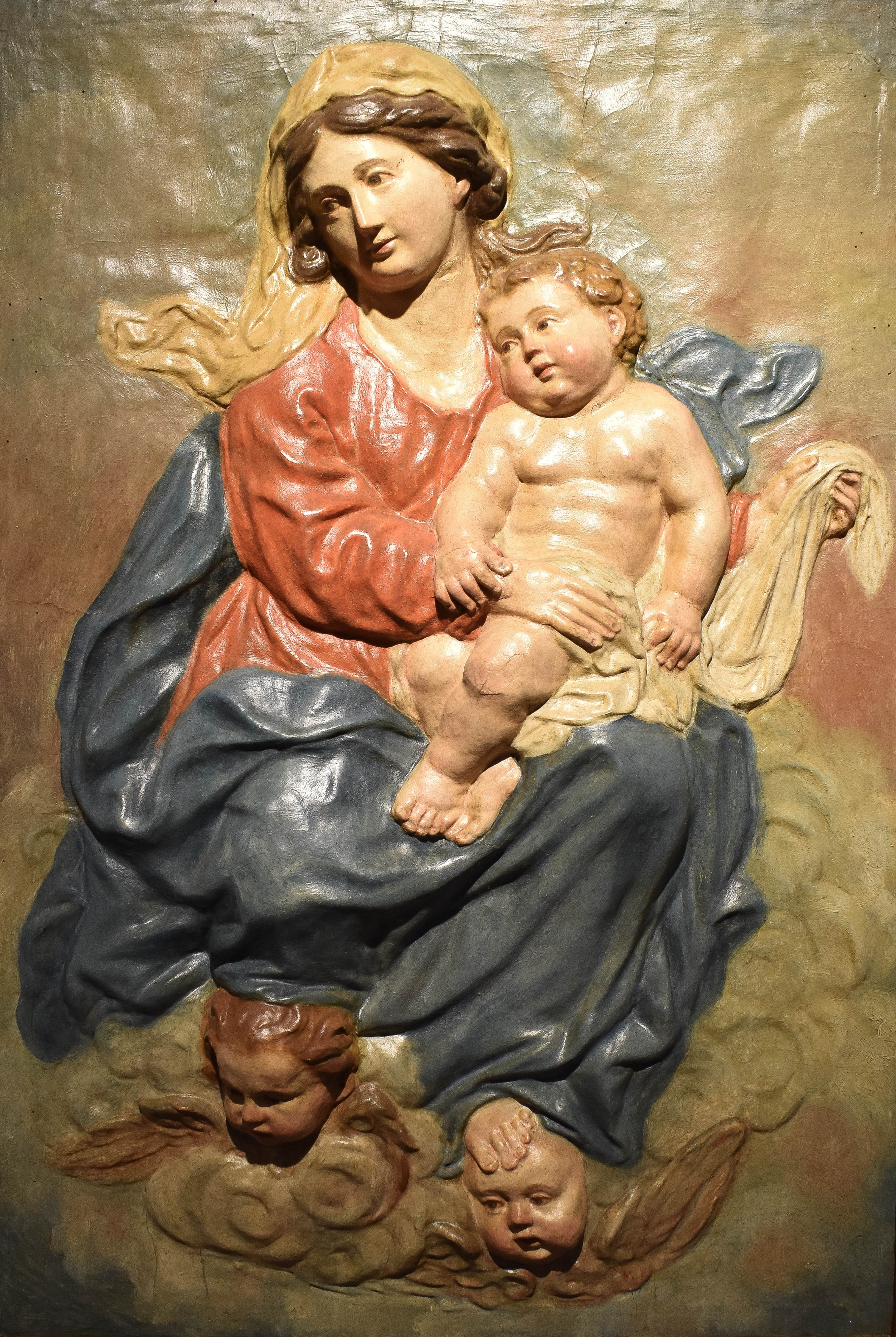 Ambito emiliano, Madonna con Bambino in gloria, sec. XVIII, cartapesta su legno, modellata e dipinta, cm 81x55, provenienza: Ospedale civile, Pinacoteca Civica, Pieve di Cento (Bologna) This is a photo of a monument which is part of cultural heritage of Italy.